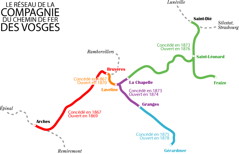 Carte du réseau de la compagnie du chemin de fer des Vosges (1867-1881), dessinée par moi-même pour l'article éponyme.